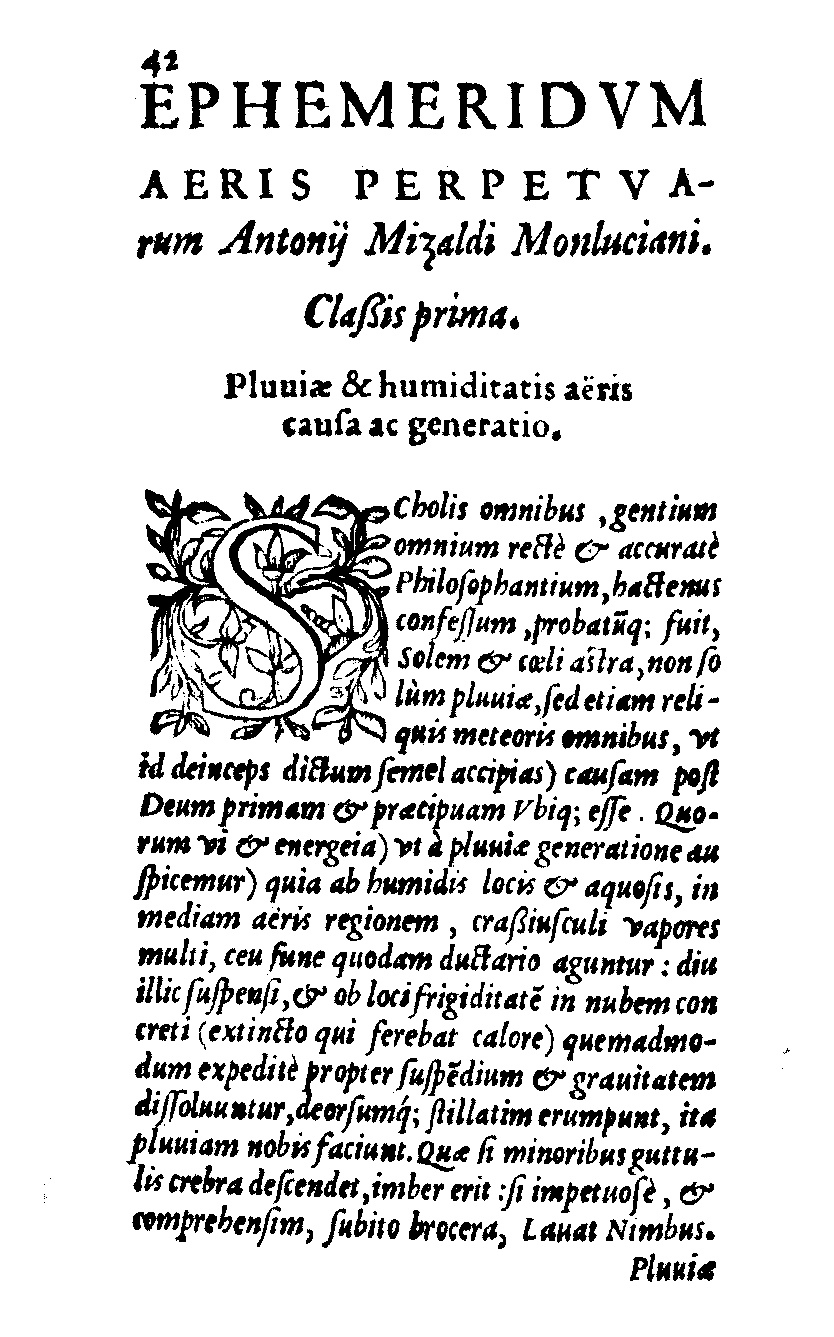 Incipit